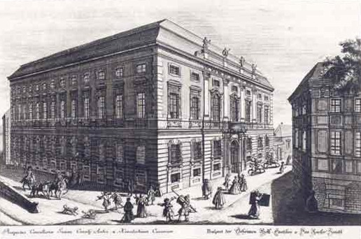 Die Hofkanzlei (Stich von Johann August Corvinus nach Salomon Kleiner)